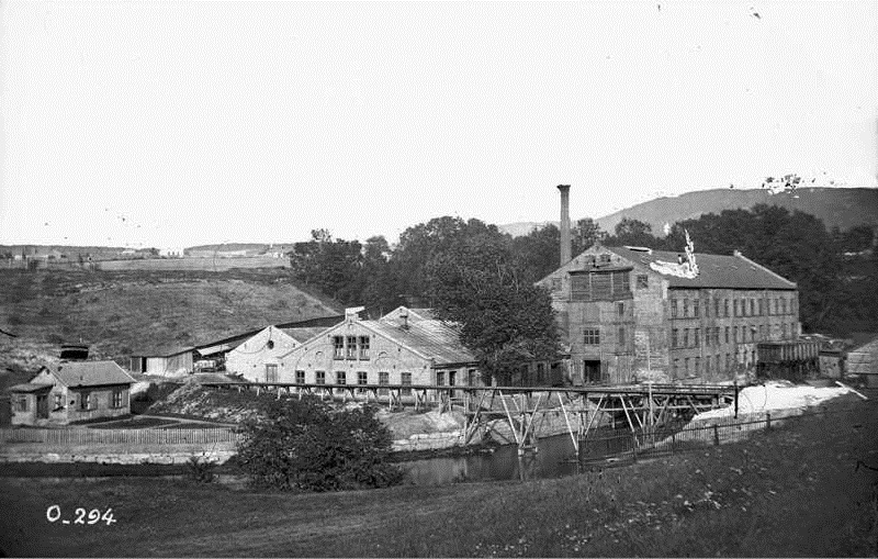 Bentse papirfabrikk mellom 1863 og 1883